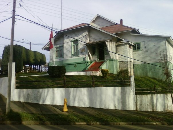 fotografia de la Comisaria de Rio Negro, institucion chilena.